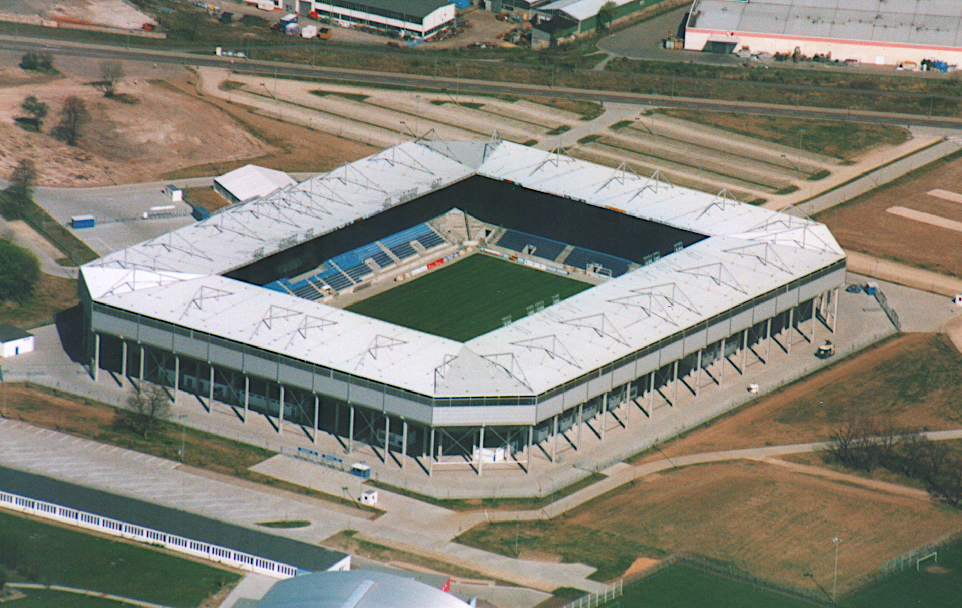 Luftaufnahme MDCC-Arena